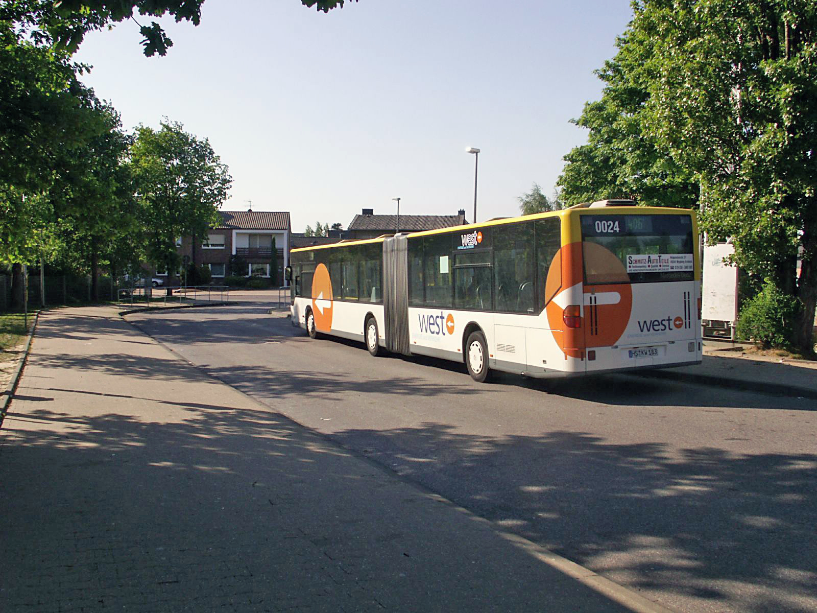 West-Bus in Ratheim